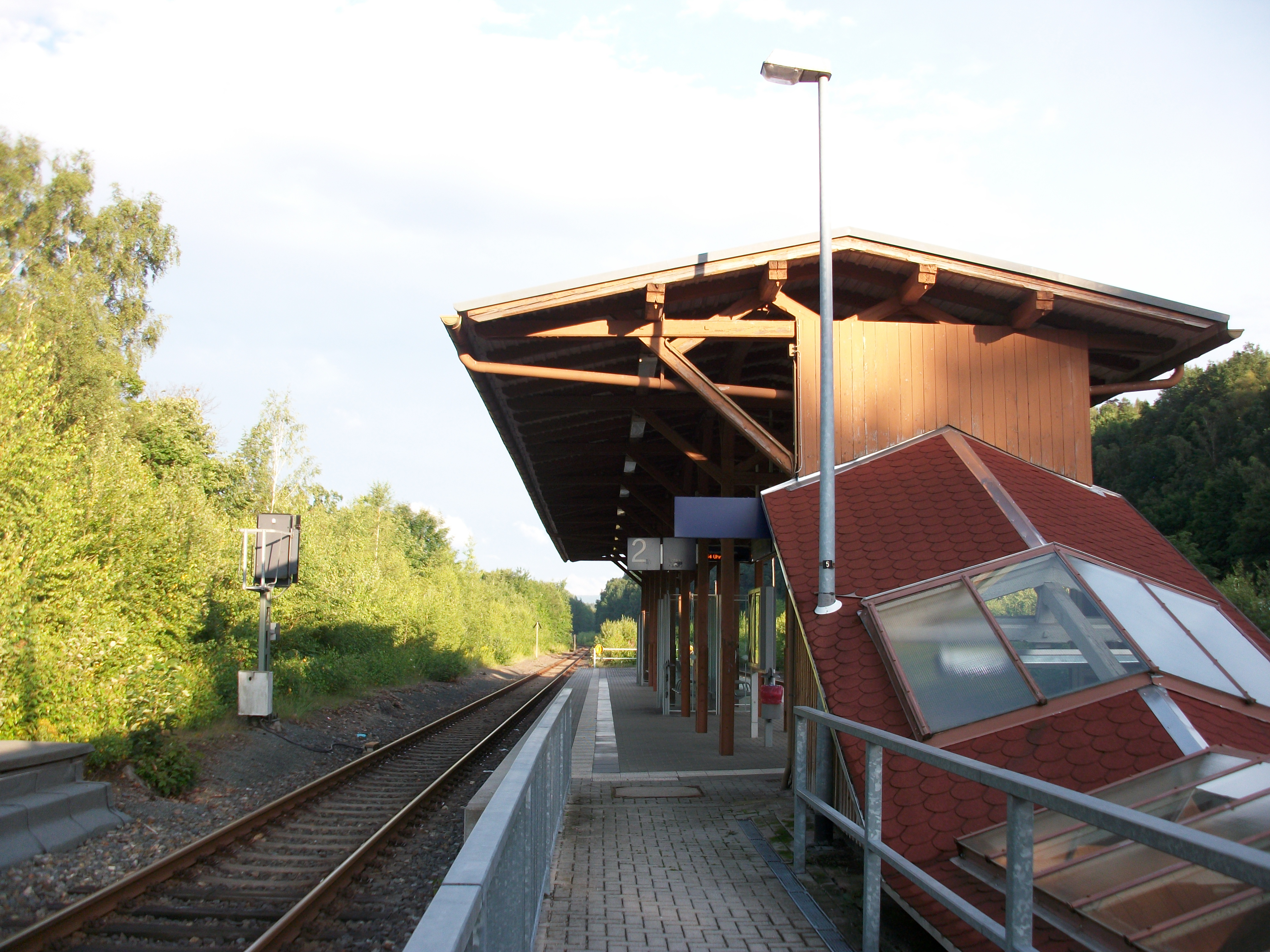 Bahnhof Lengenfeld (Vogtl), Bahnsteige (2017)